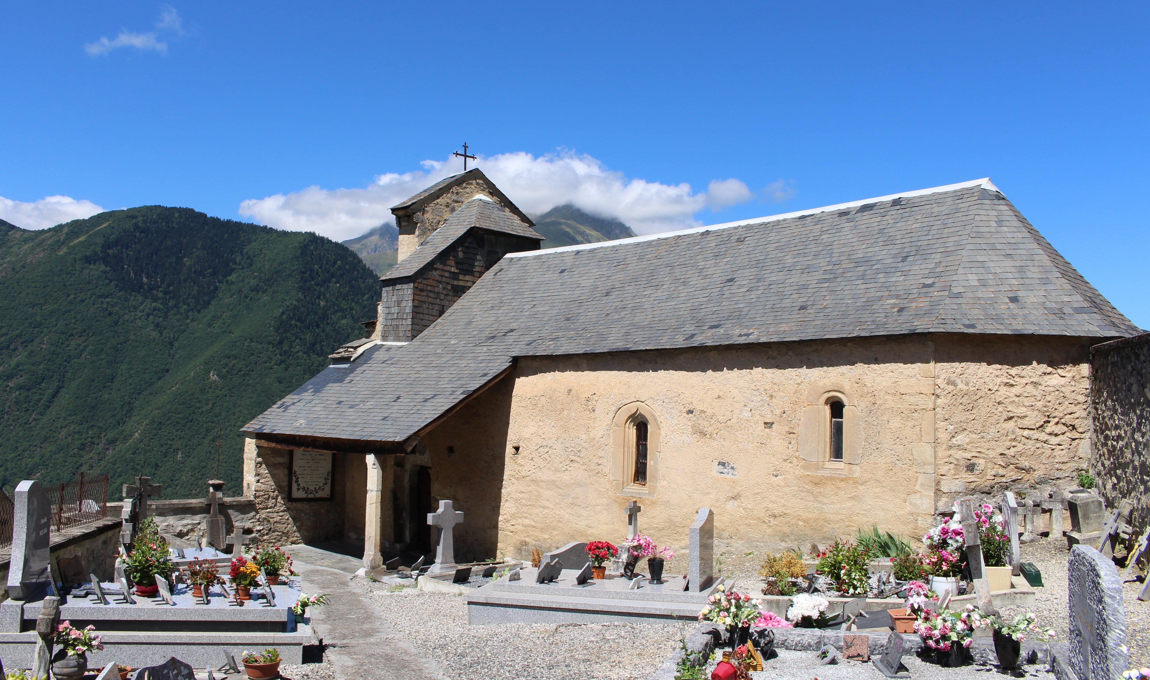 Église Saint-Martin de Grailhen (Hautes-Pyrénées)